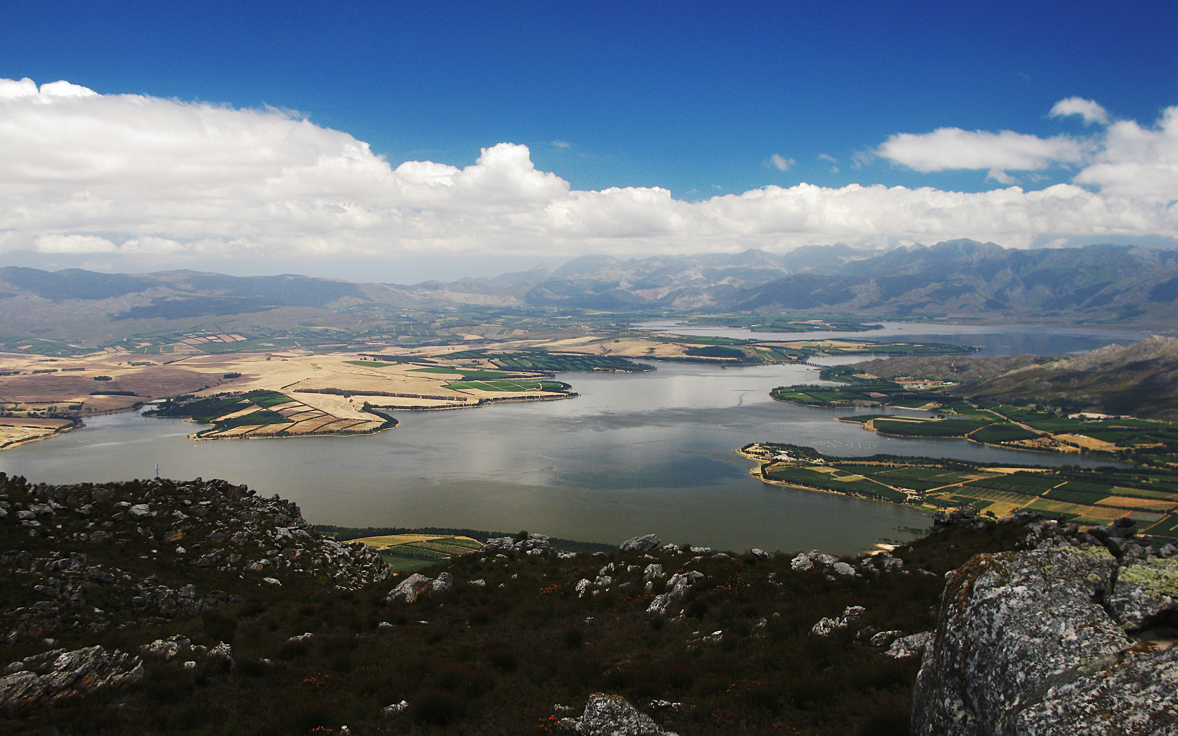 Foto van die Theewaterskloofdam, suidoos vanaf Villiersdorp geneem.